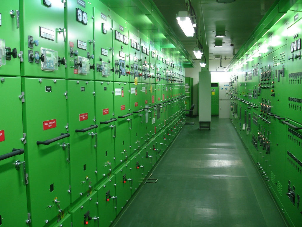 Schalttafel mit Mittelspannung